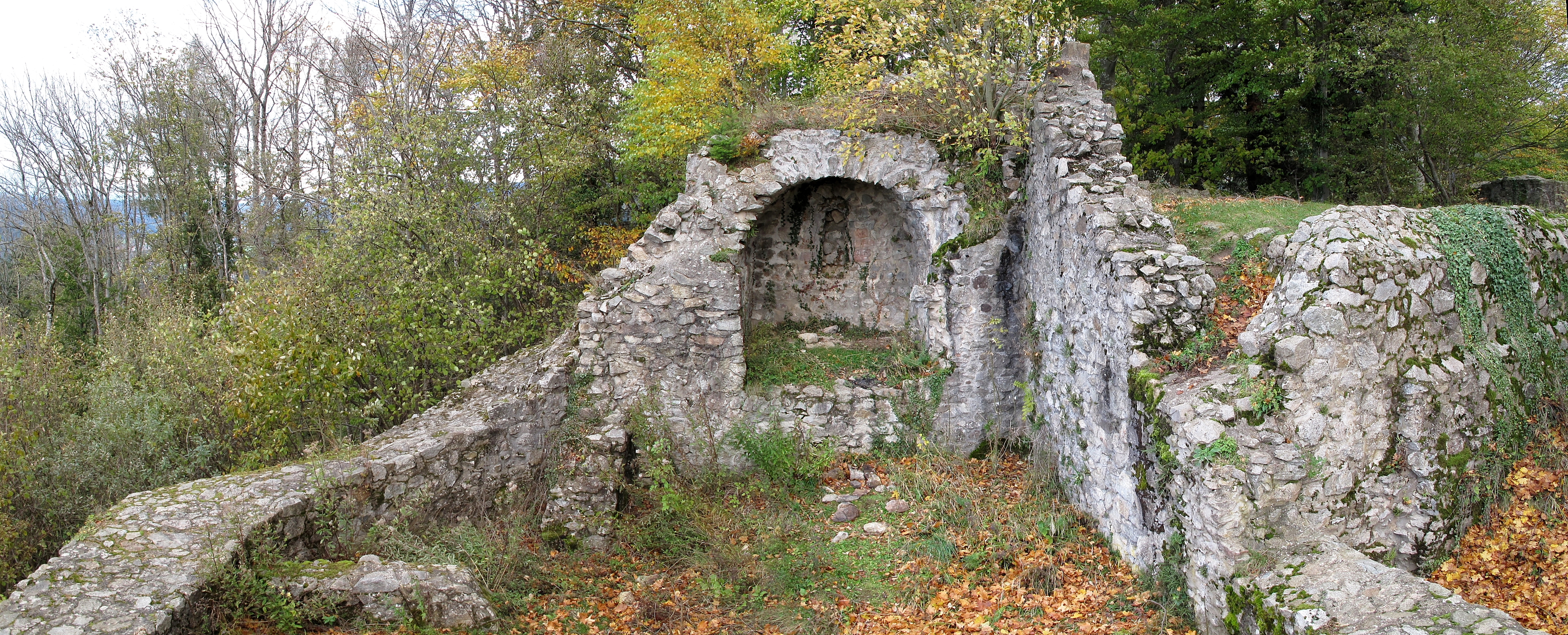 Ehemalige Kapelle